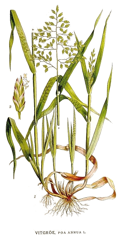 Poa annua L. Original Description "Vitgröe", Poa annua L.